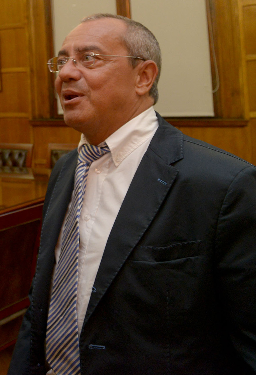 El Ministerio de Agroindustria estrecha lazos con Brasil y Francia. El Ministro de Agroindustria, Ricardo Buryaile, mantuvo un encuentro con los embajadores de Brasil y de Francia para analizar temas de la agenda comercial.